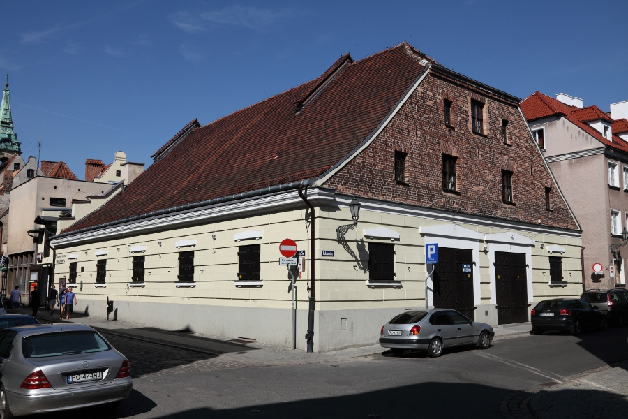 Toruń, ul. Rabiańska 20 - Twierdza Toruń: wozownia artyleryjska i magazyn wojskowy, 1819-21, 1895 (zabytek nr A/165)